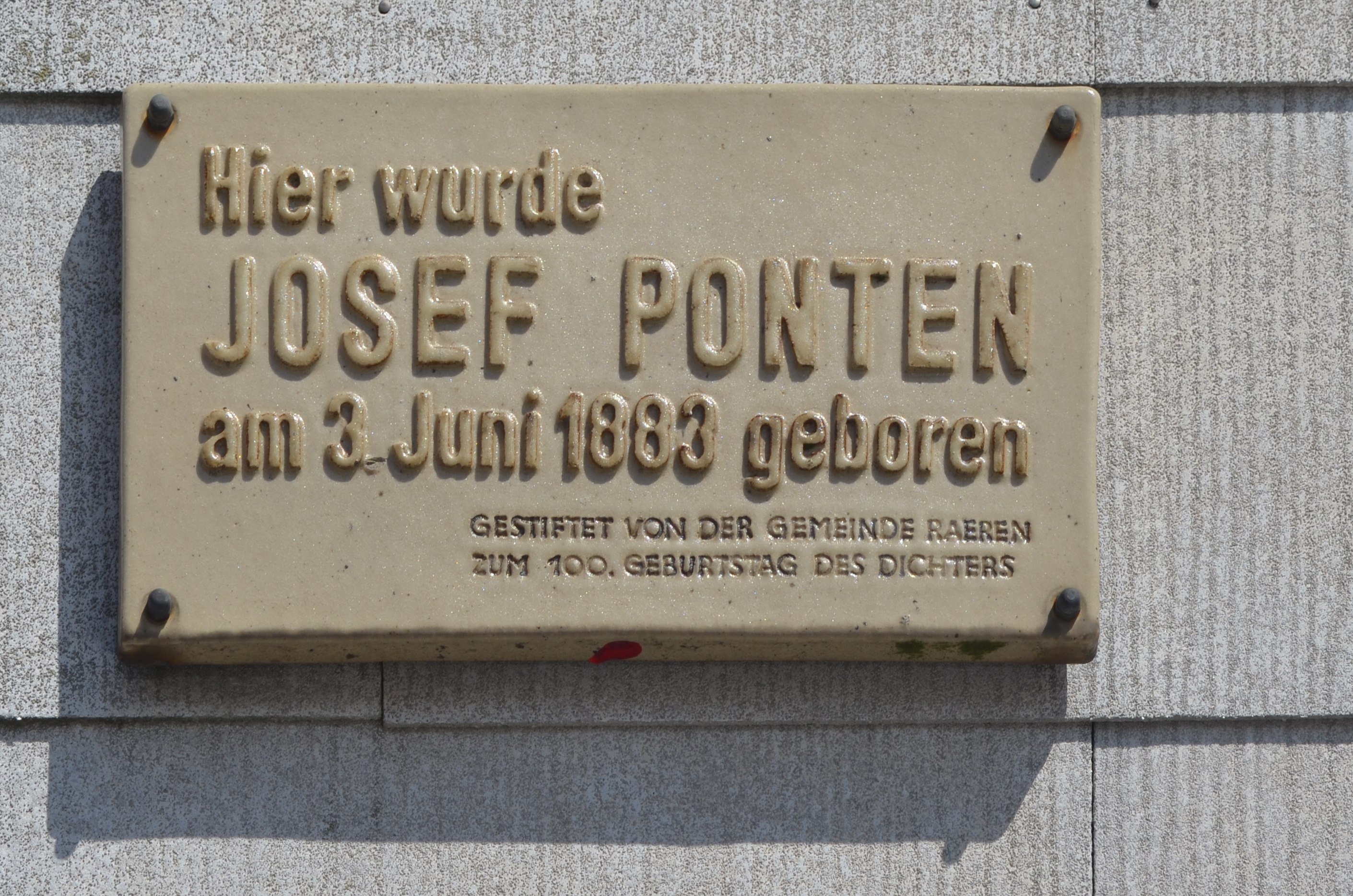 Raeren - Maison où est né Josef Ponten. Plaque commémorative à l'occasion du centième anniversaire de sa naissance.